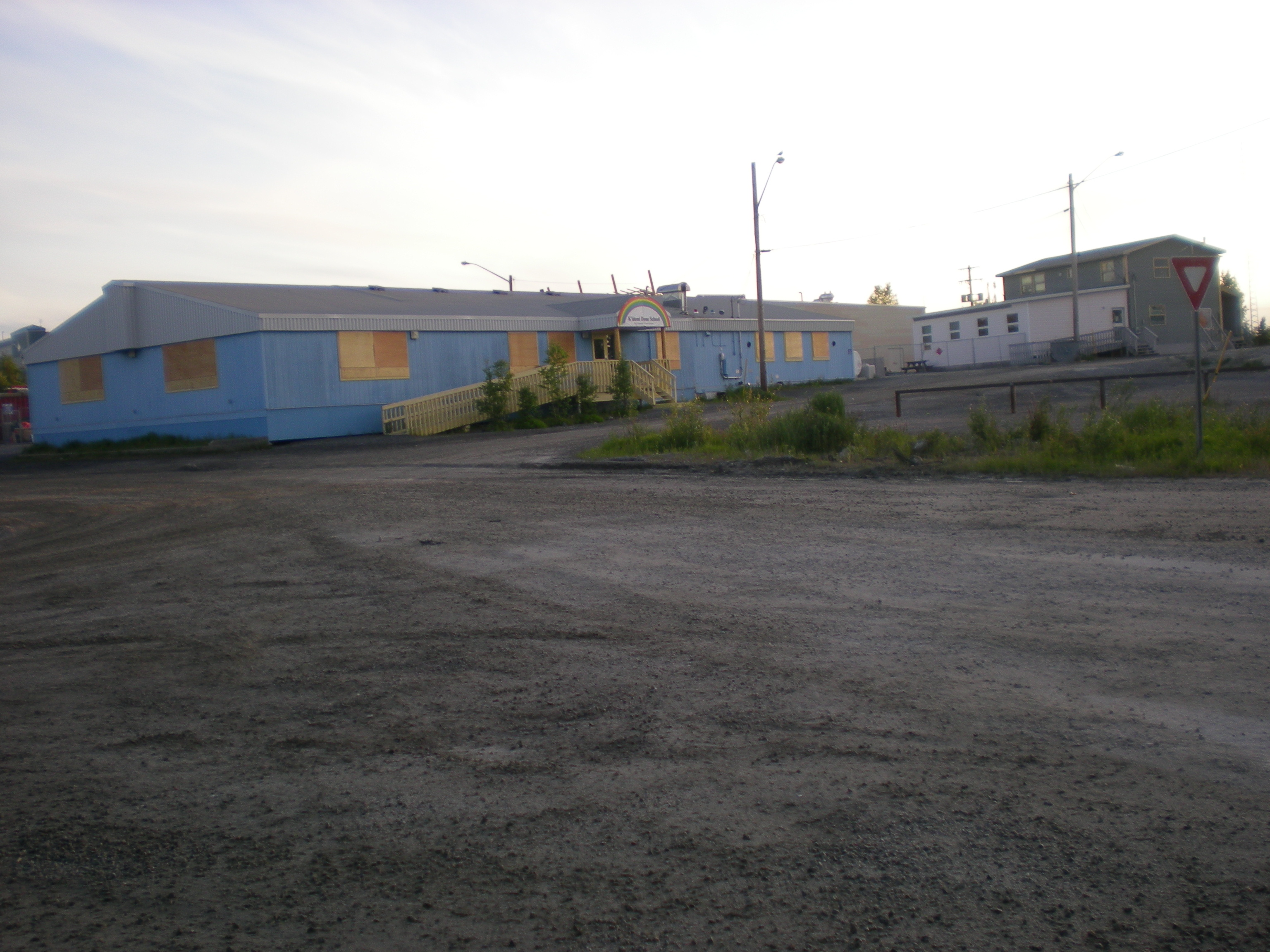 K'àlemì Dene School